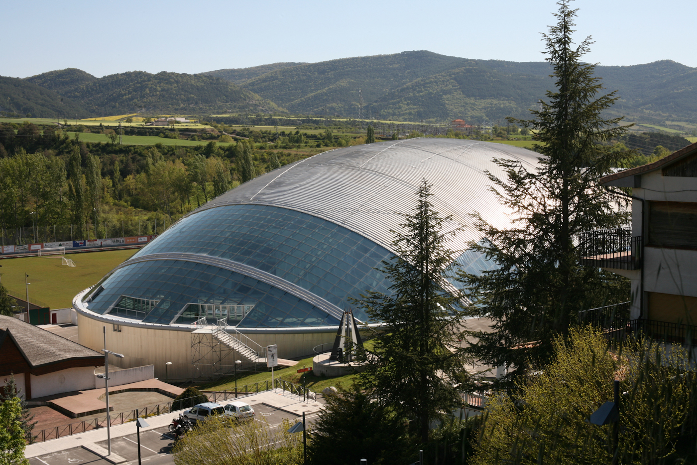 Eissporthalle in Jaca, Spanien